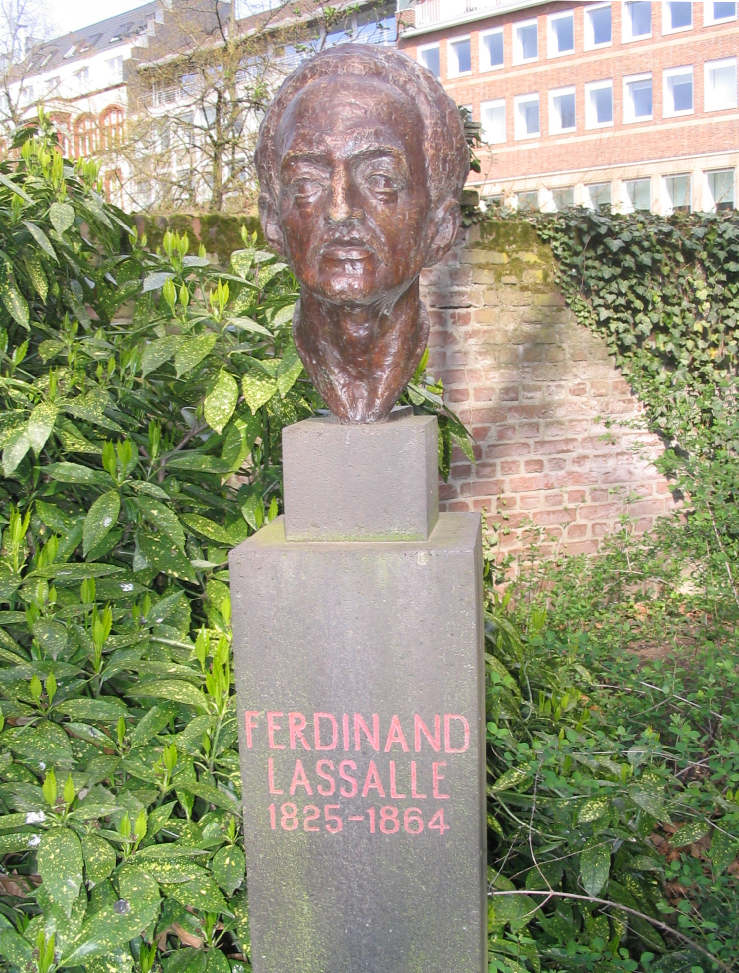 Düsseldorf, Spee'scher Park. Büste für Ferdinand Lasalle Im Speeschen Park hinter dem Stadtmuseum Düsseldorf befindet sich diese Kopie einer im Jahre 1979 geschaffenen Bronzebüste. Auf einer Basaltstele das Abbild von Ferdinand Lassalle (1825-1864). Das Original des Bildhauers Wilhelm Martini befindet sich weiterhin im Stadtmuseum Düsseldorf. Inschrift (Infotafel): "Wilhelm Martini / Ferdinand Lassalle / 1979/1980, Stein/Bronze / Die Büste erinnert an Ferdinand Lassalle (1825-1864), Politiker, Publizist, Arbeiterführer und Begründer der Deutschen Sozialdemokratie. / Landeshauptstadt Düsseldorf". Inschrift (Sockel): "FERDINAND LASSALLE 1825-1864".